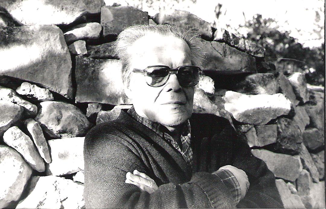 Jòrgi Reboul, lors du tournage du film "un jorn que bofavo lo mistrau"